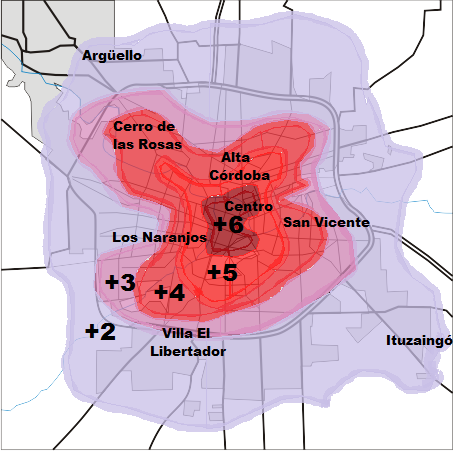 Islas de calor en la ciudad de Córdoba